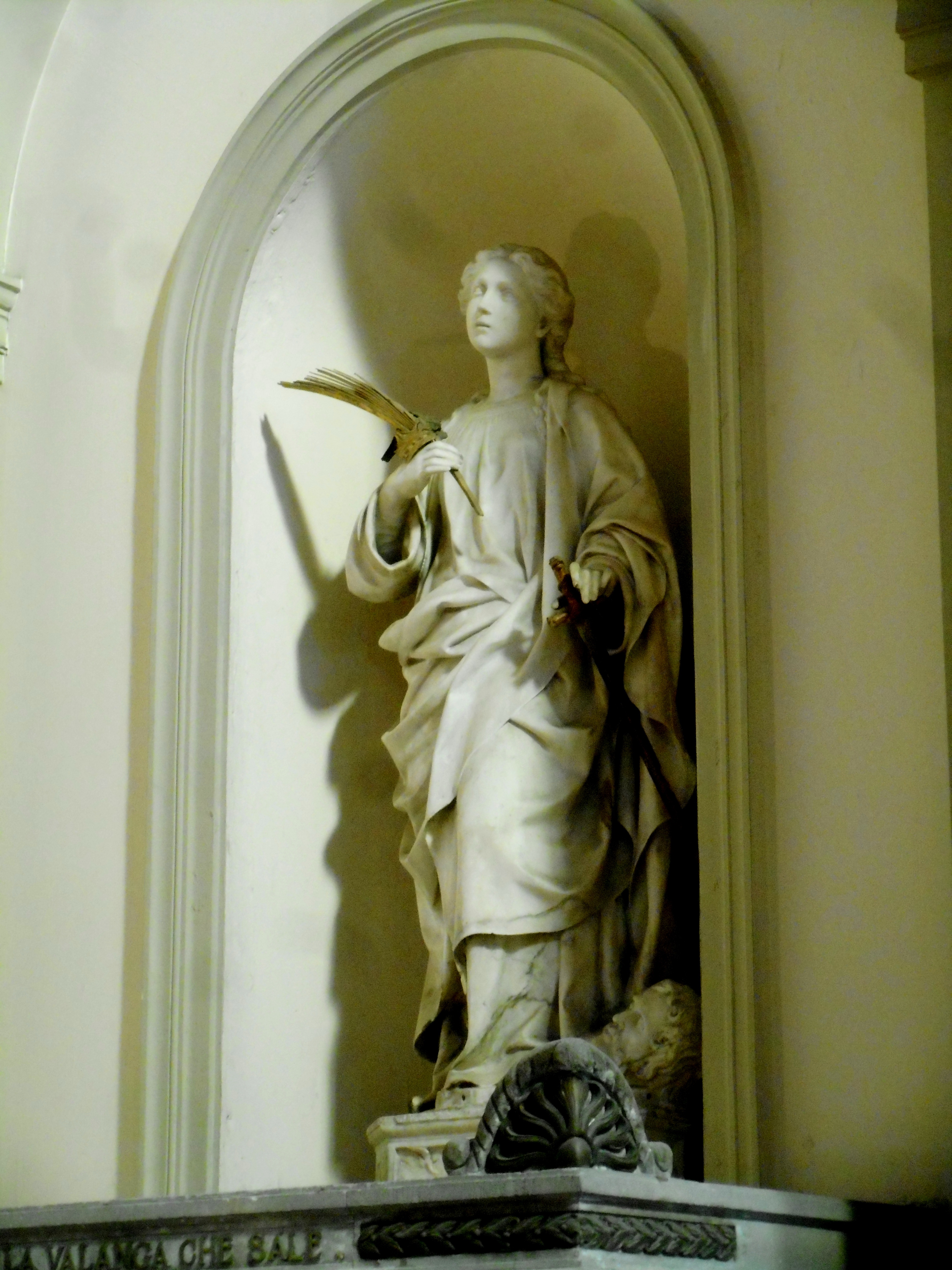 Statua di Santa Caterina d'Alessandria in San Domenico a Palermo